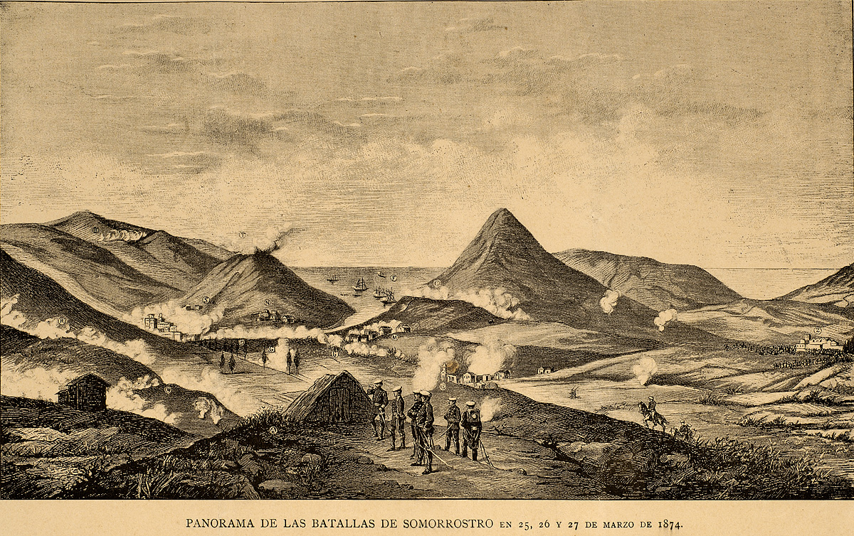 Somorrostroko batailen ikuspegia 1874ko martxoaren 25, 26 eta 27an